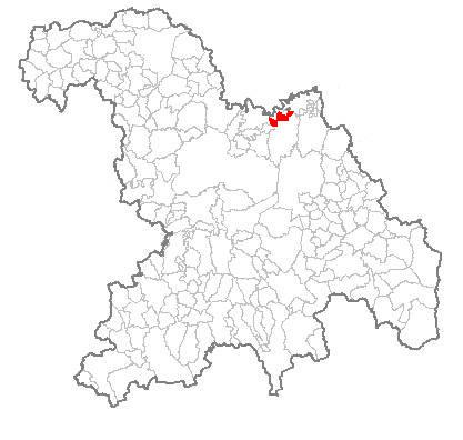 Mappa del comune di Alluvioni Cambiò (AL).